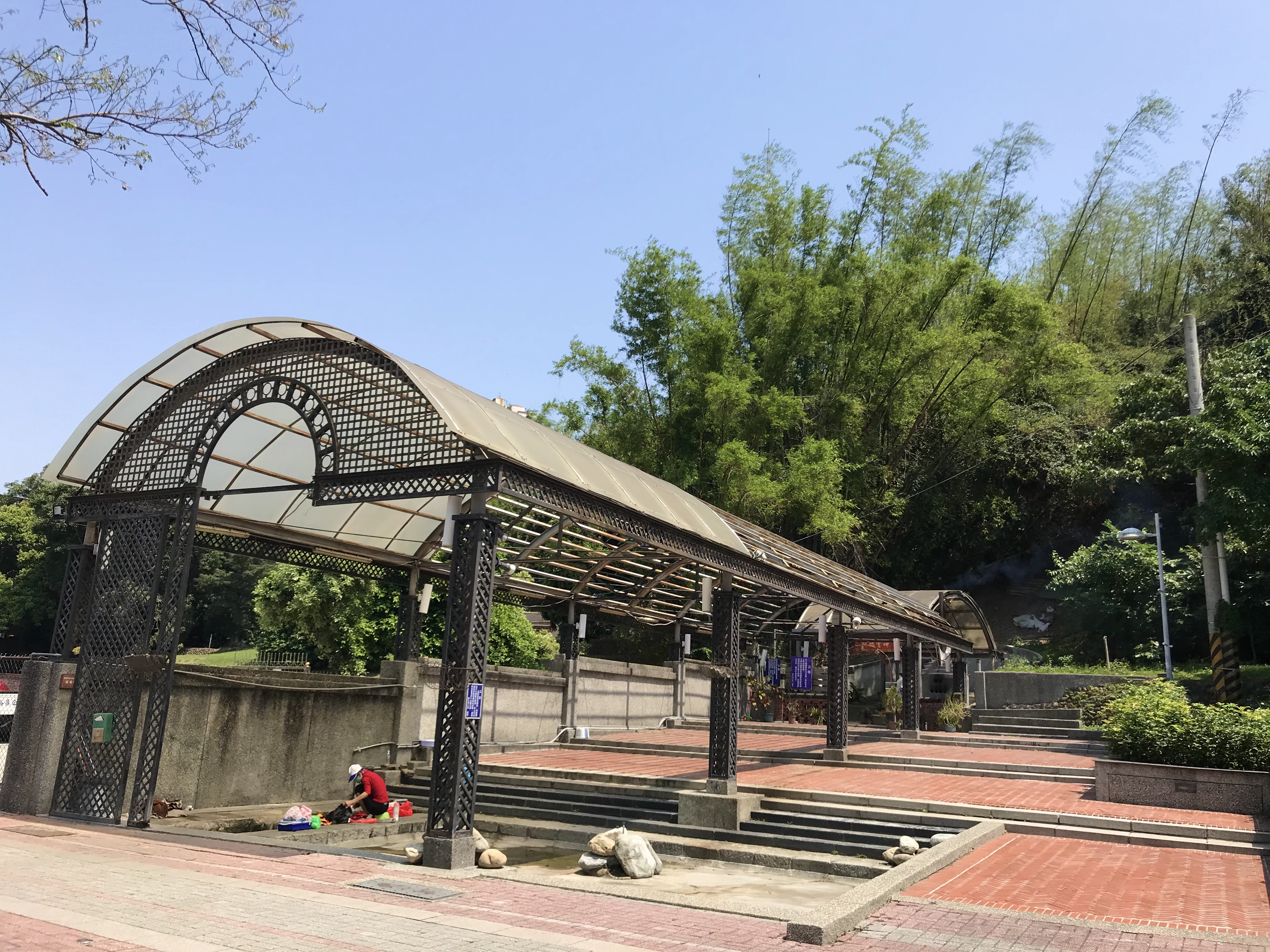 八卦山紅毛井與洗衣池